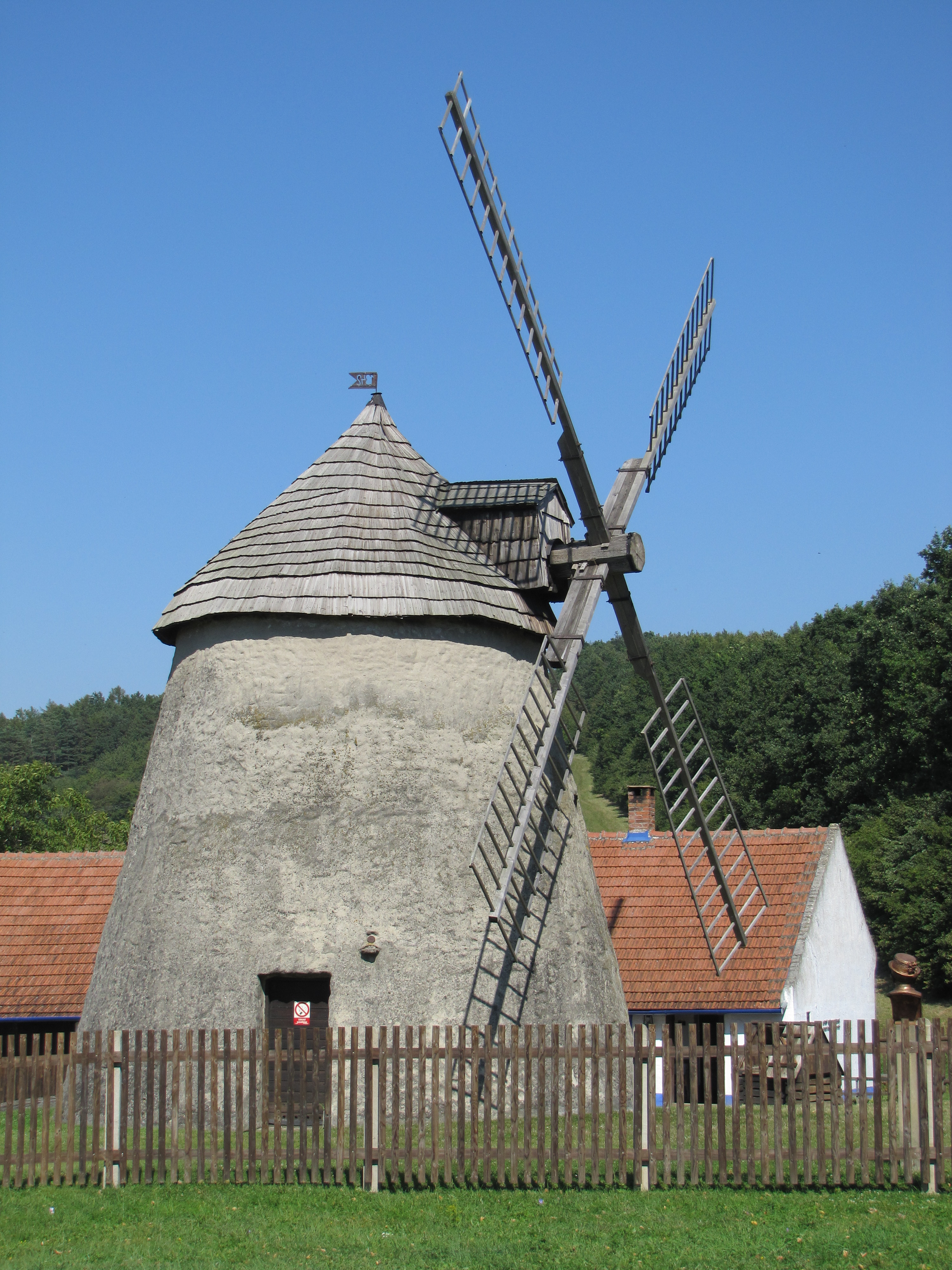 Větrný mlýn Kuželov